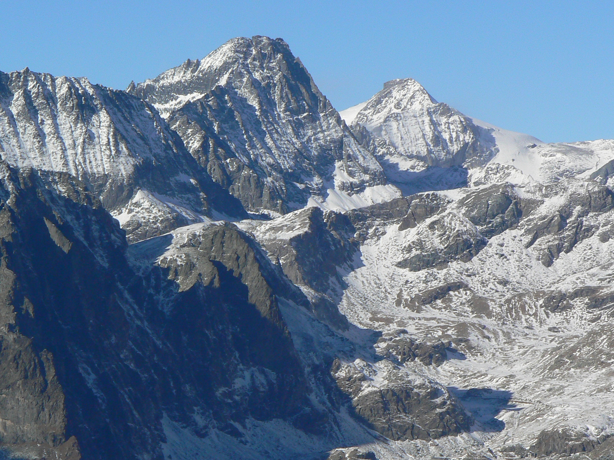 Uia di Bessanese e Albaron di Savoia - Alpi Graie